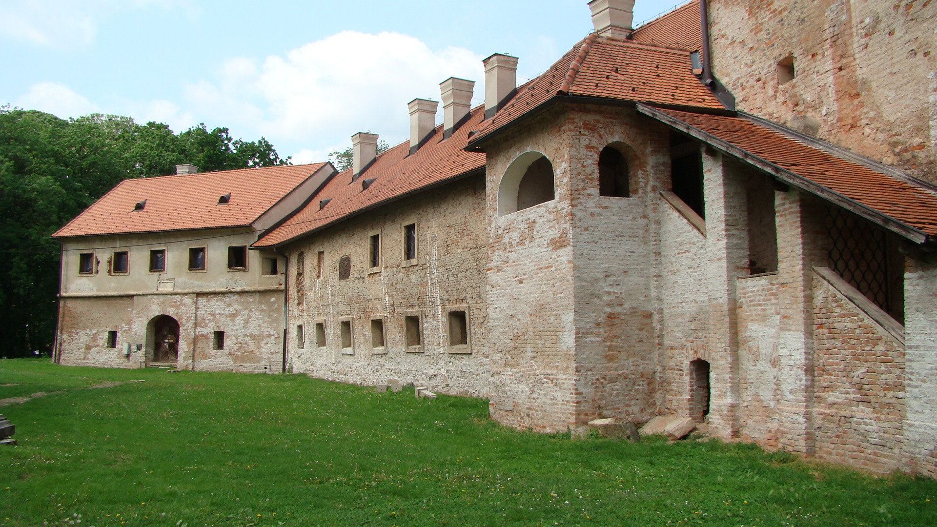 Dvorac Zrinski, Čakovec